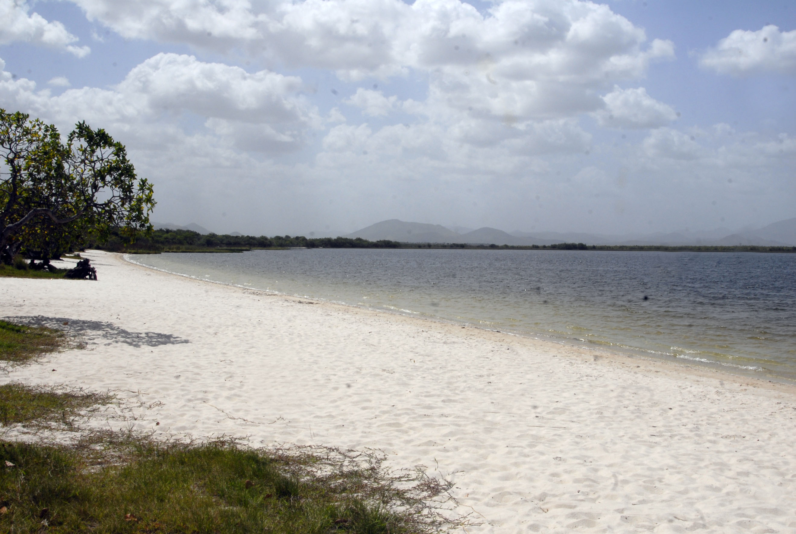 Terra indígena Raposa Serra do Sol - Brazil